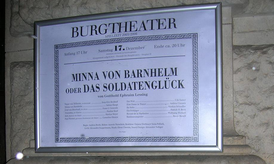 Ein typisches Burgtheater-Plakat